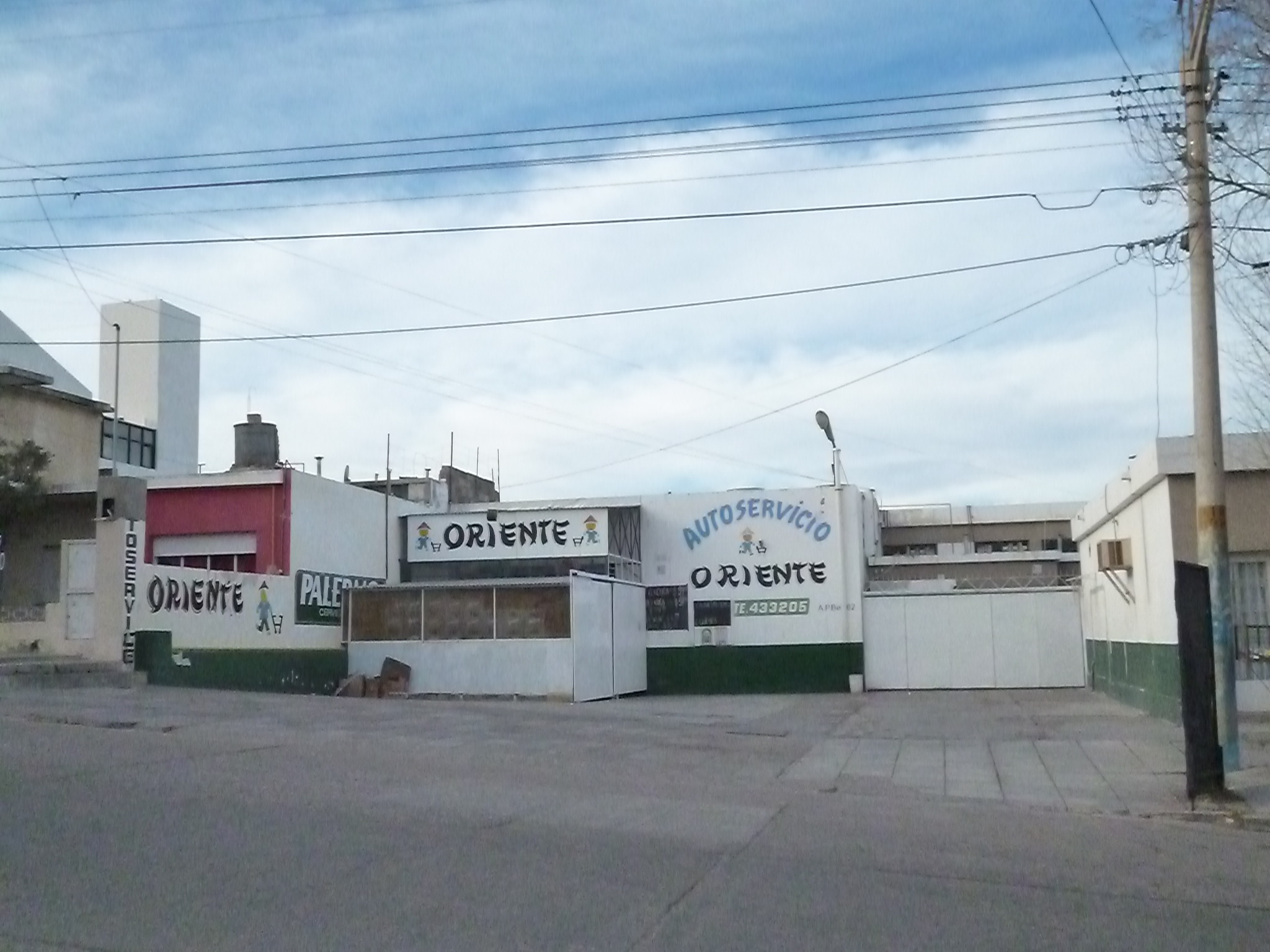 Super Chino Oriente